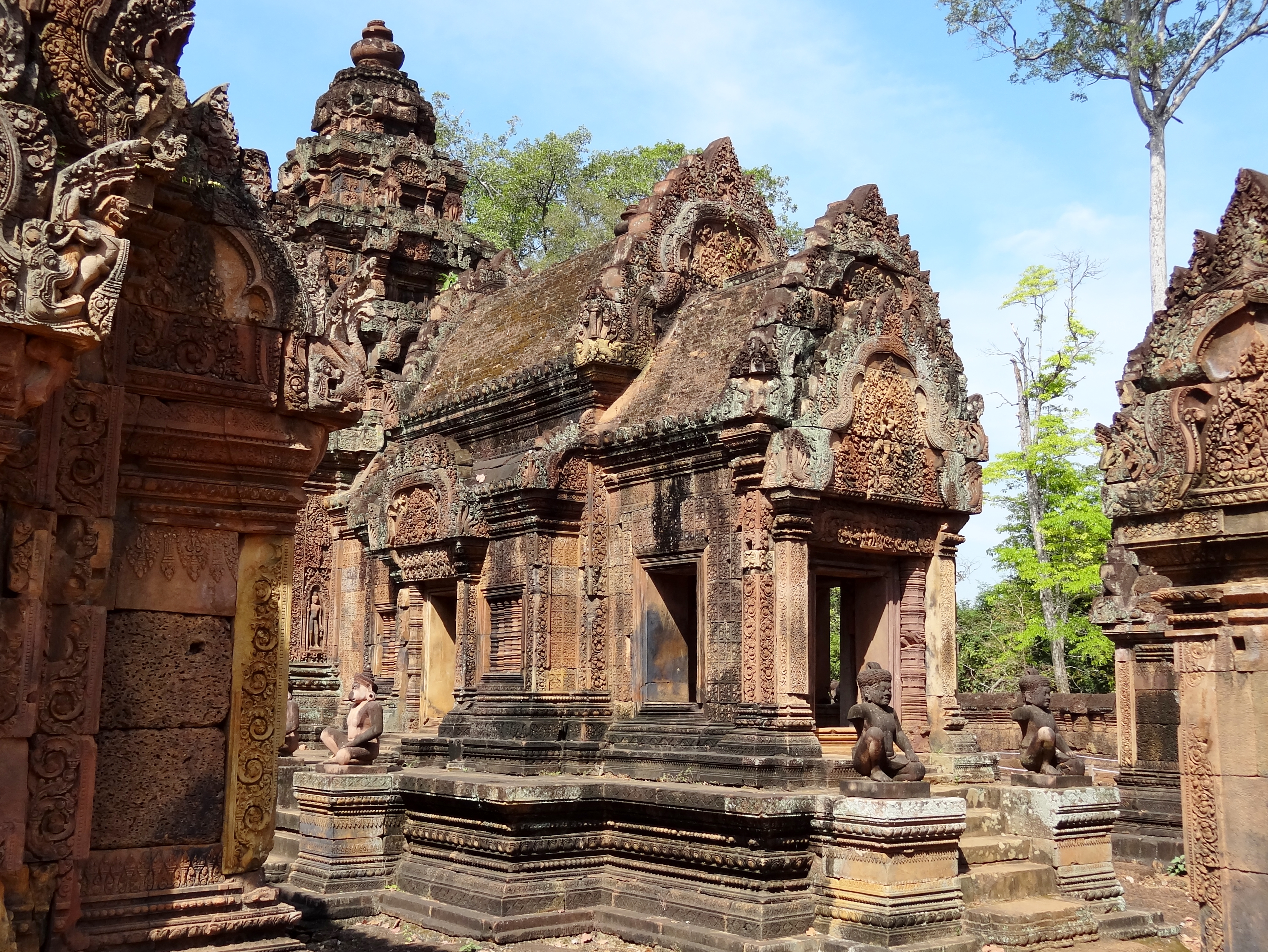 Mandapa vor dem zentralen Prasat der Banteay Srei (ប្រាសាទបន្ទាយស្រី ‚Zitadelle der Frauen‘), ursprünglich Tribhuvanamahesvara (‚Großer Gott der dreifaltigen Welt‘), Provinz Siem Reap, Kambodscha